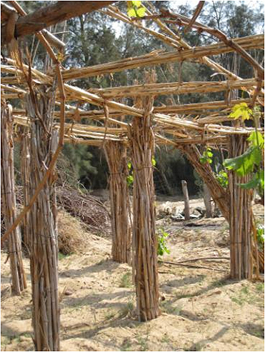 Pergola aus Schilfrohr am Nil, Ägypten